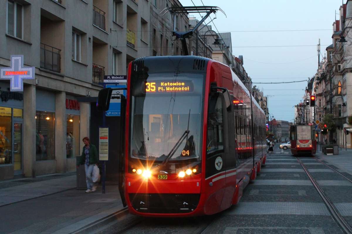 Tramwaj Pesa Twist stoi na przystanku Plac Wolności w Katowicach. This photo was taken during Railway Wikiexpedition 2014 set up by Wikimedia Polska Association in cooperation with Fundacja Grupy PKP. You can see all photographs in category Wikiekspedycja kolejowa 2014.